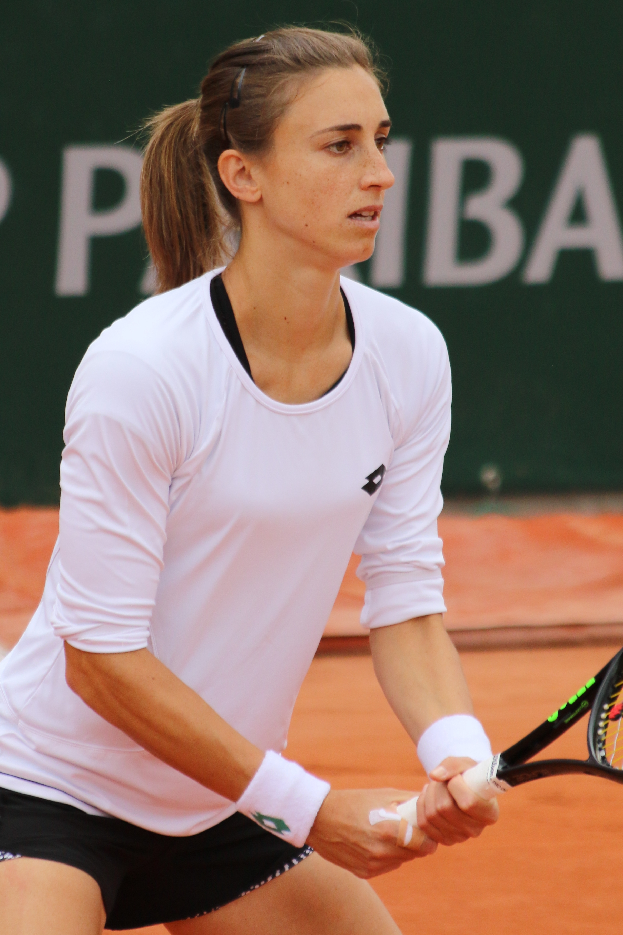 Martic RG19 (16)